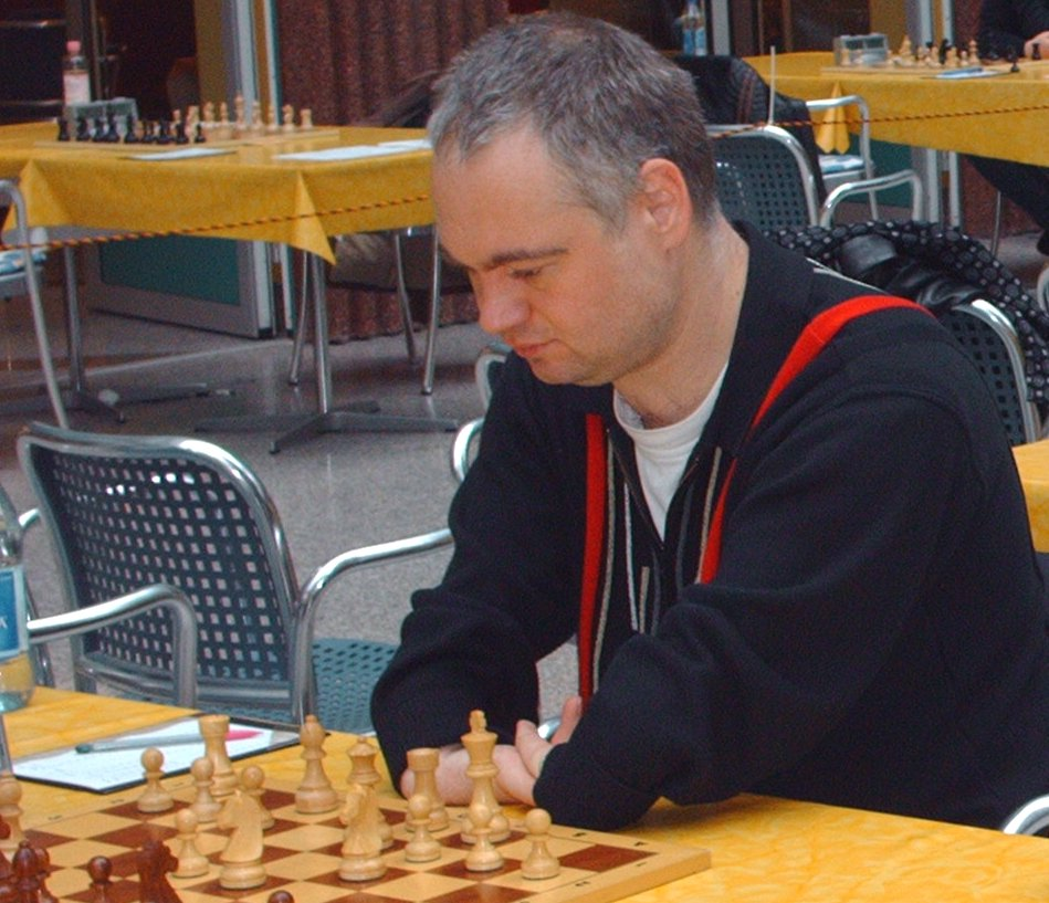 Thomas Luther am 19. November 2006 bei einem Bundesliga-Wettkampf in Berlin-Tegel